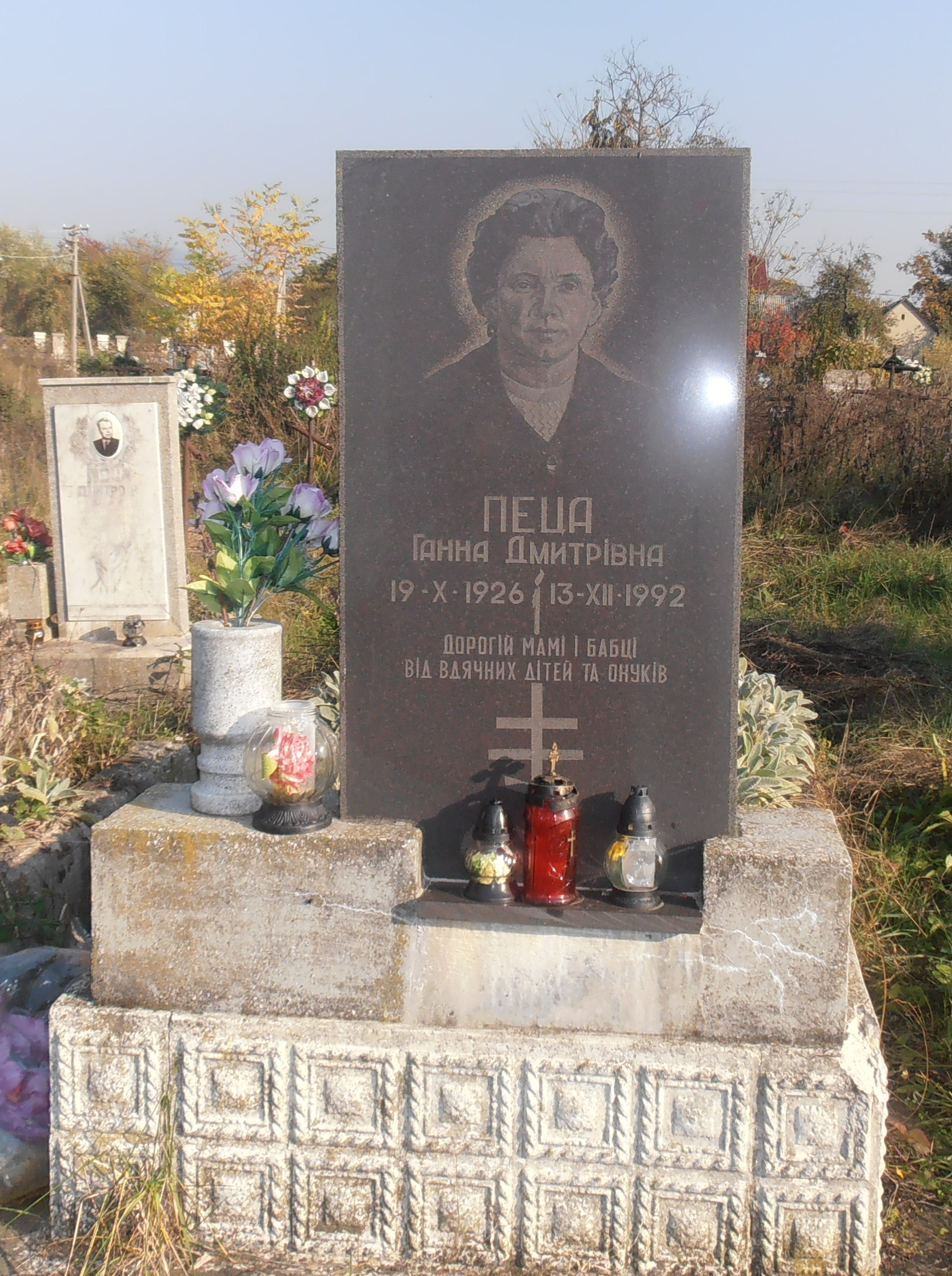 Могила Героя Соціалістичної Праці Ганни Пеци (с.Руське, Мукачівський район)